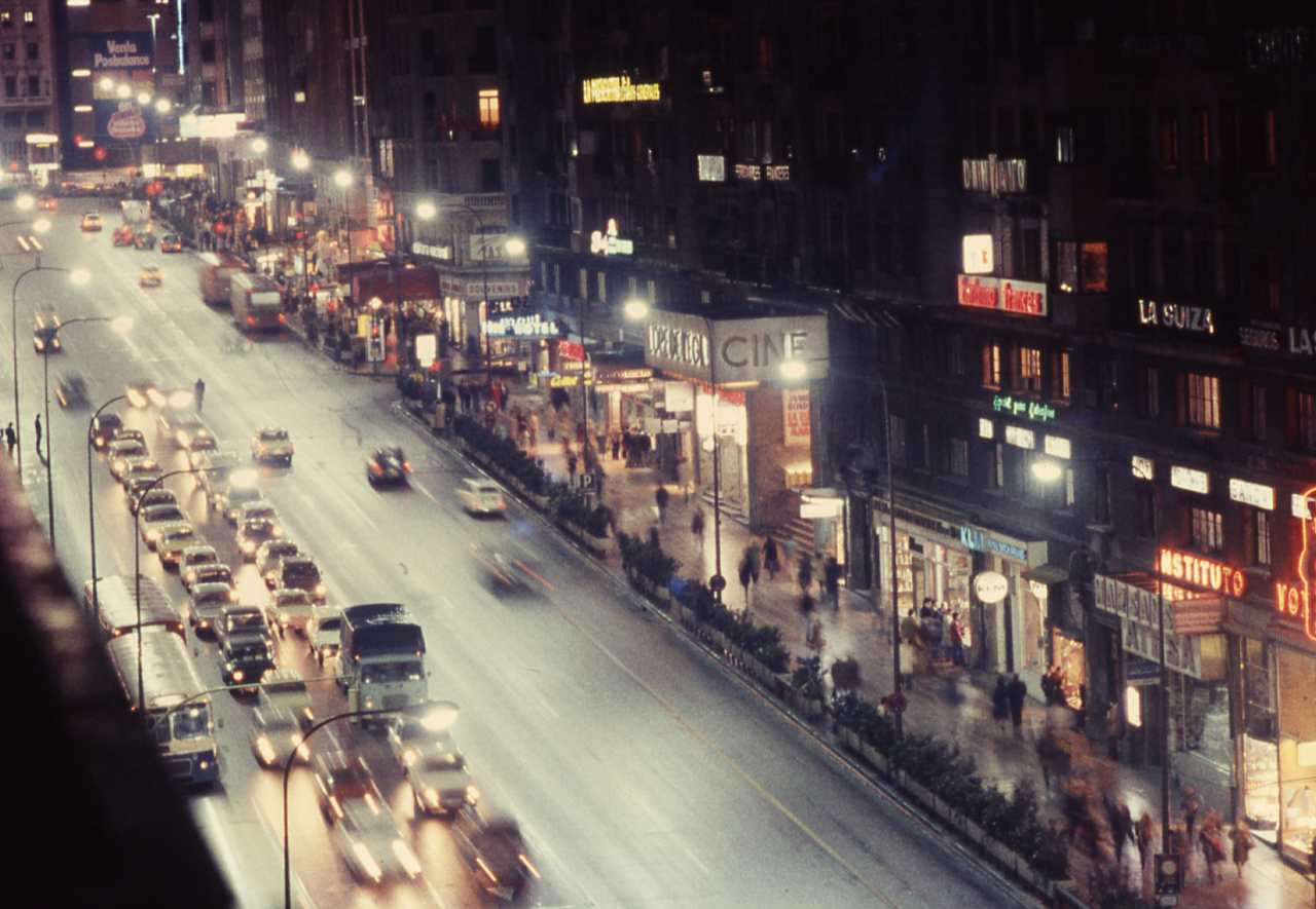 Servizio fotografico : Madrid, 1980 / Paolo Monti. - Foglio: 1, Fotogrammi complessivi: 20/20 : Diapositiva, sviluppo cromogeno/ pellicola ; 35 mm. - ((Iscrizione manoscritta su una striscia di cartoncino bianco: "Spagna/ Madrid" all'interno del contenitore. - Fonte: Rubrica di Paolo Monti: Diapositive 24x36mm (1948-1982), presso Archivio Paolo Monti. Rubrica con elenco soggetti e numeri di inventario (da 1 a 1000) corrispondenti ai fogli a tasche in pvc in cui sono contenute le diapositive.